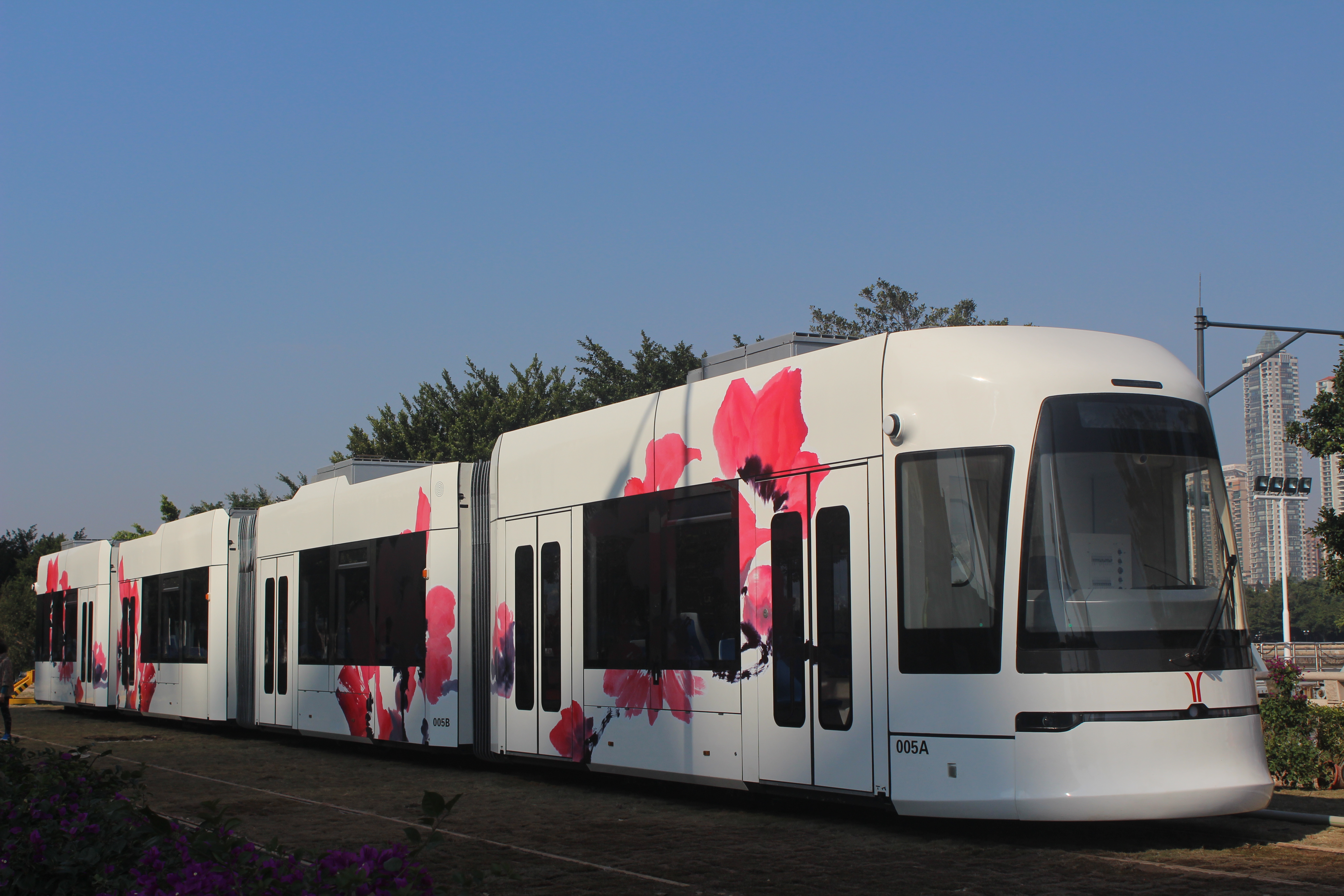 广州市海珠有轨电车车辆第5号列车